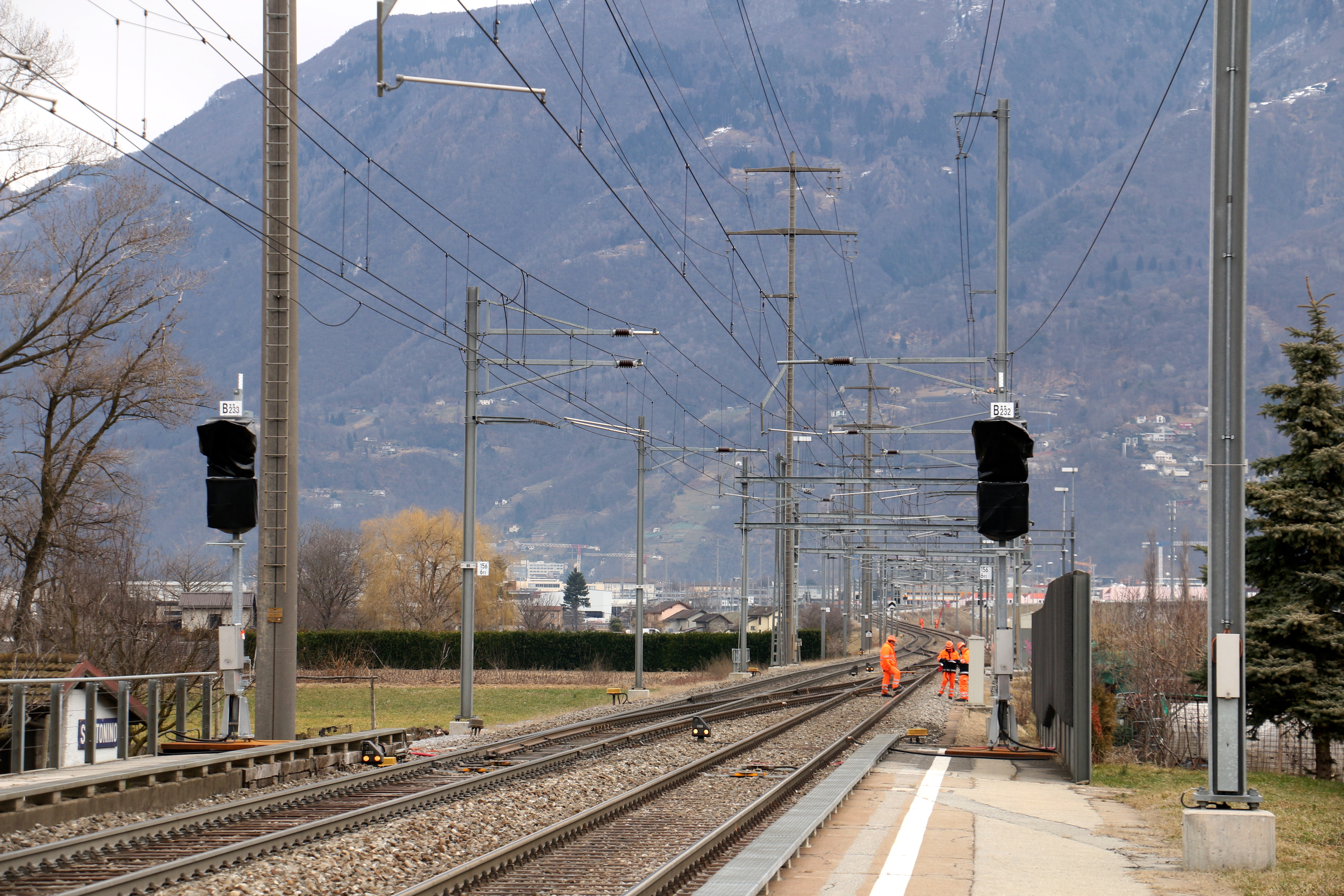 Bahnstrecke Locarno-Giubiasco (2018)